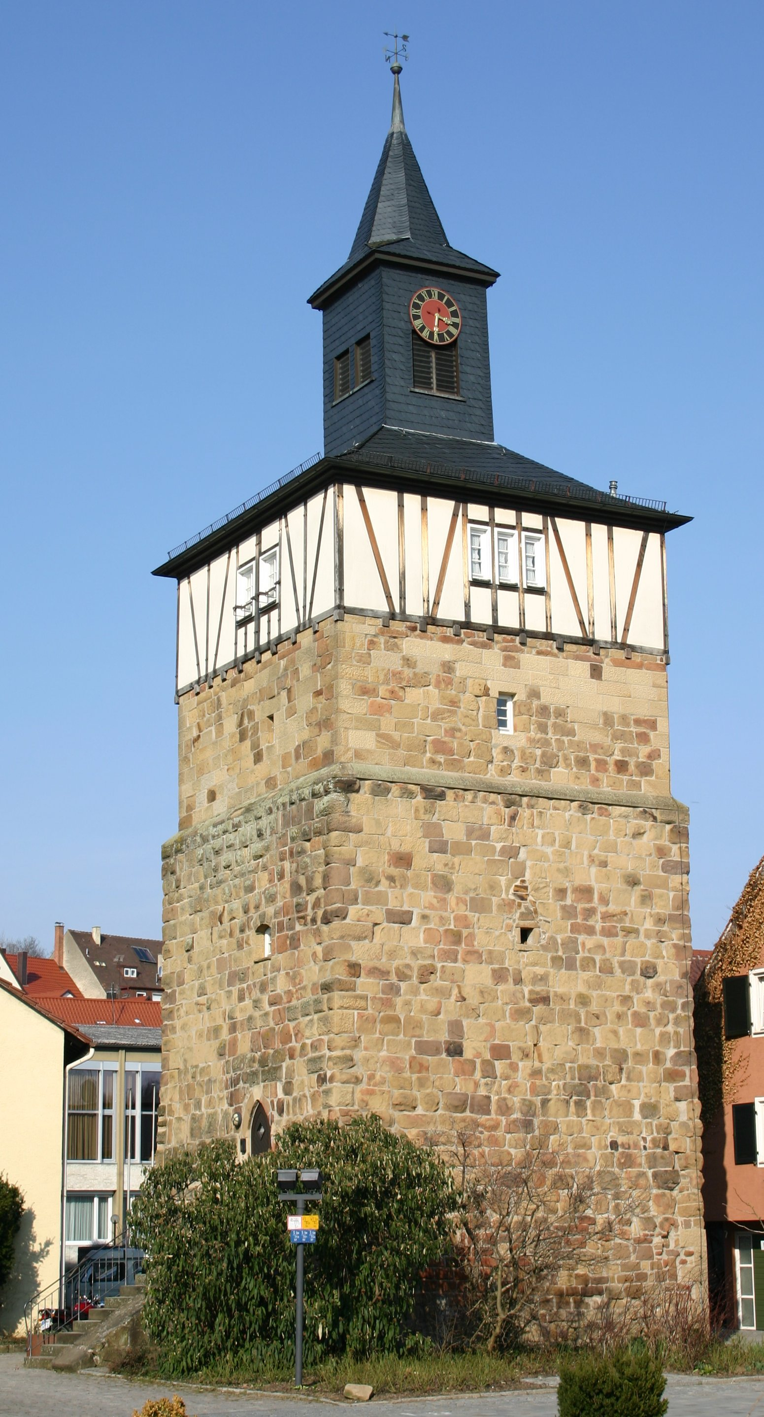 Weinsberg, Wachturm